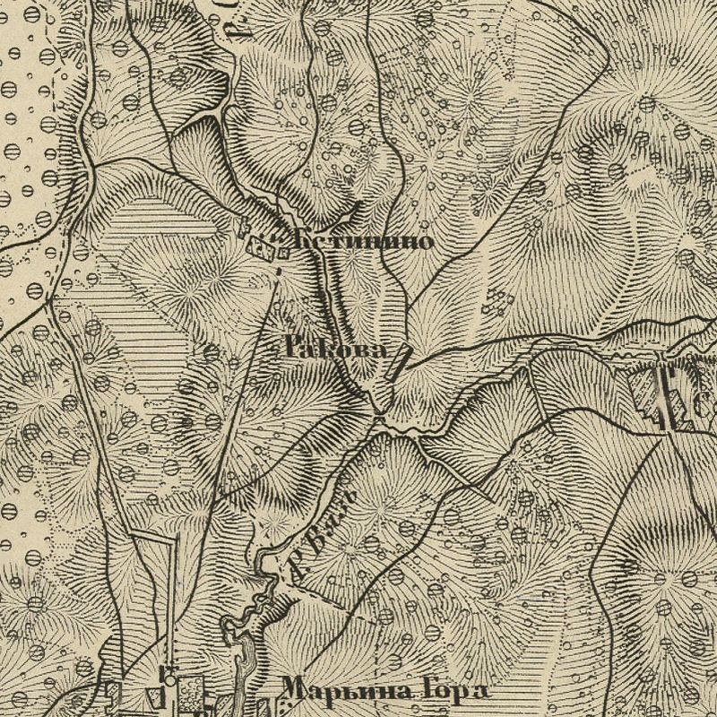 Деревня Кстинино Пушкинского района Московской области России на карте Московской губернии Ф. Ф. Шуберта